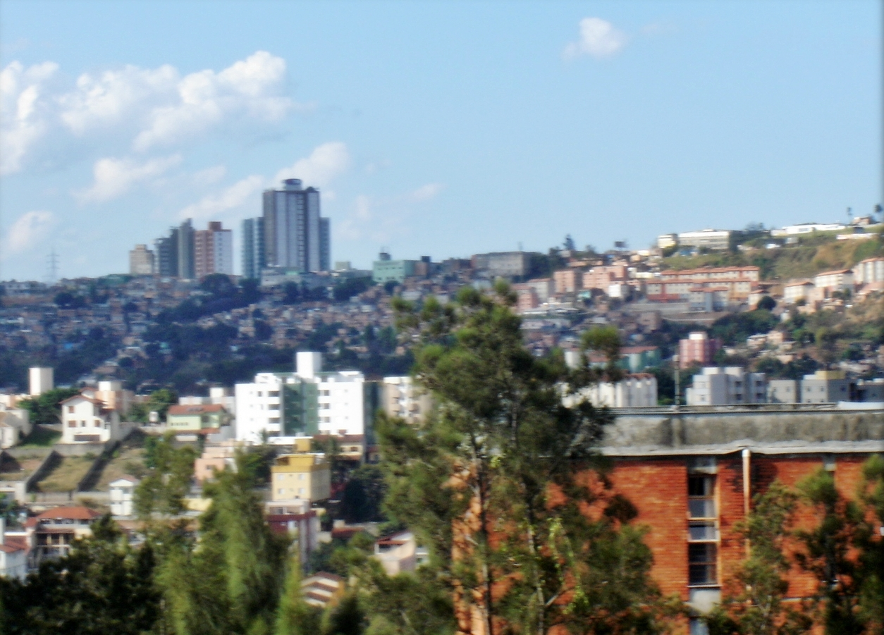 Foto Estrela Dalva